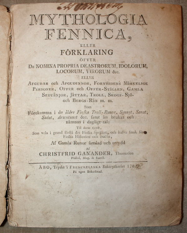 Mythologia Fennican 1. painoksen nimilehti (1789).